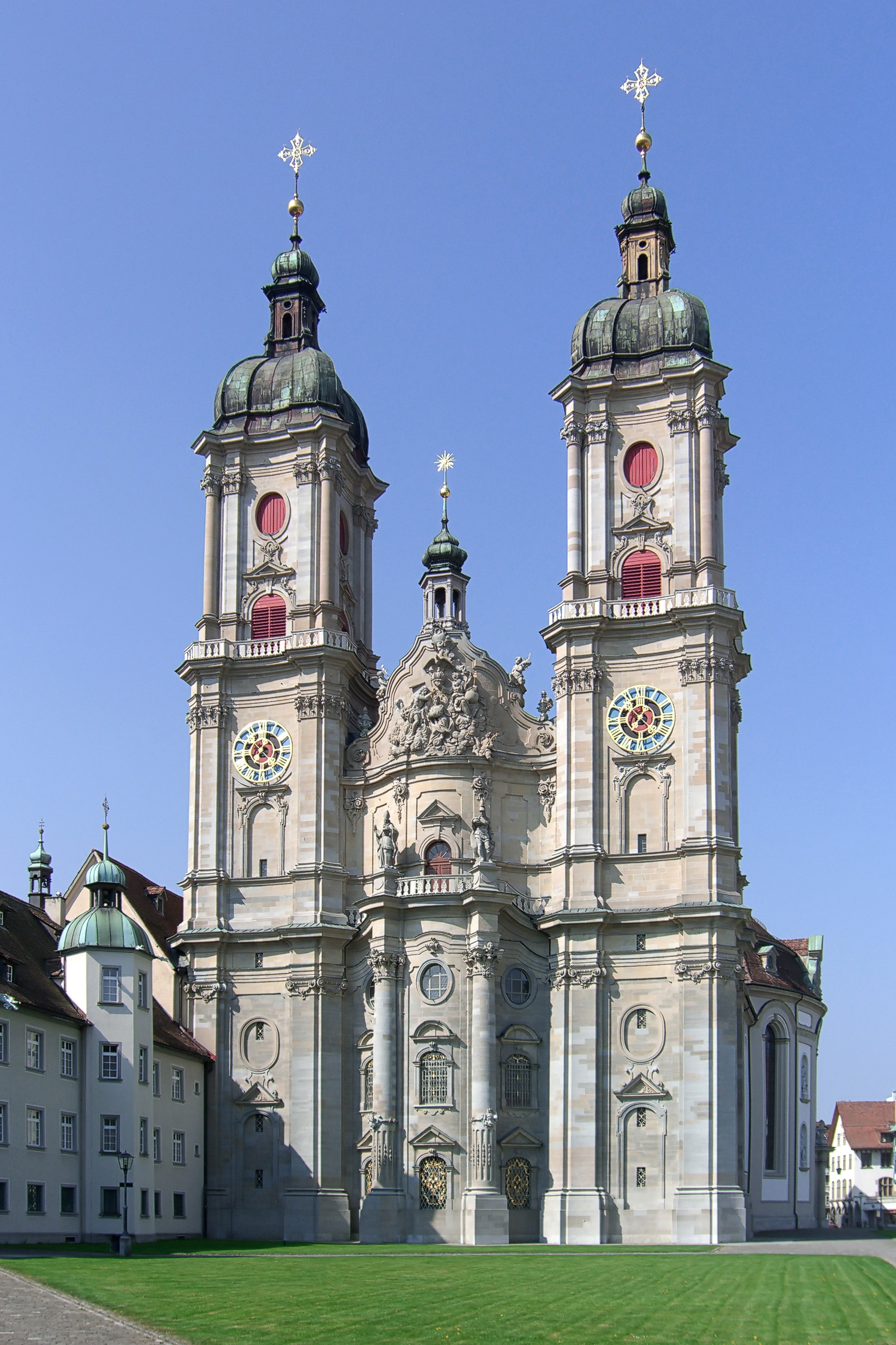 Stiftskirche St. Gallen